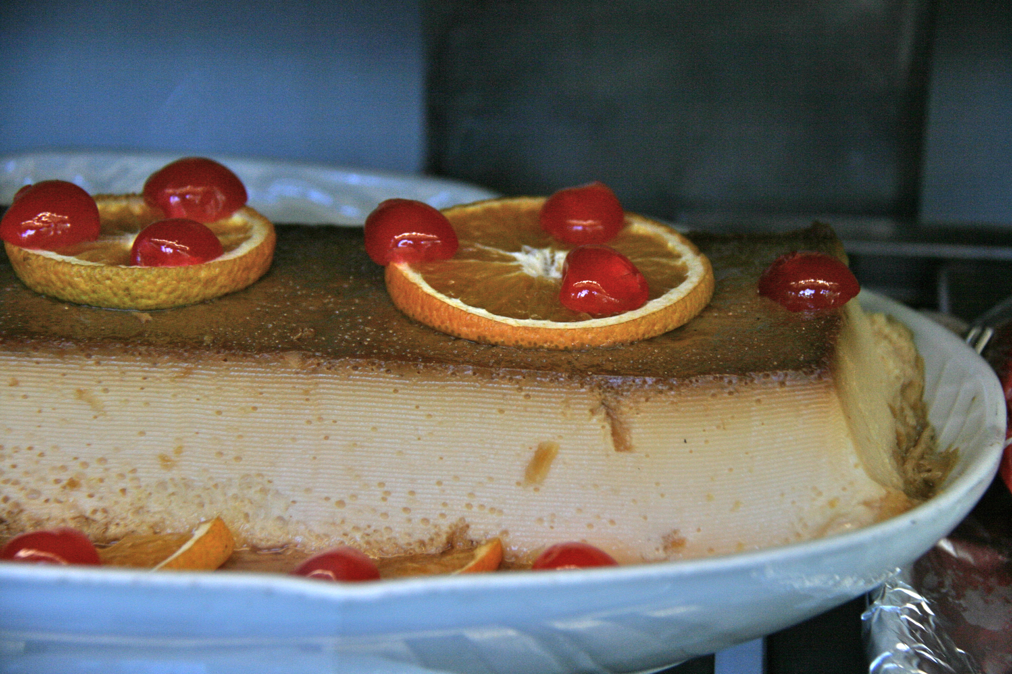 Pan de Calatrava